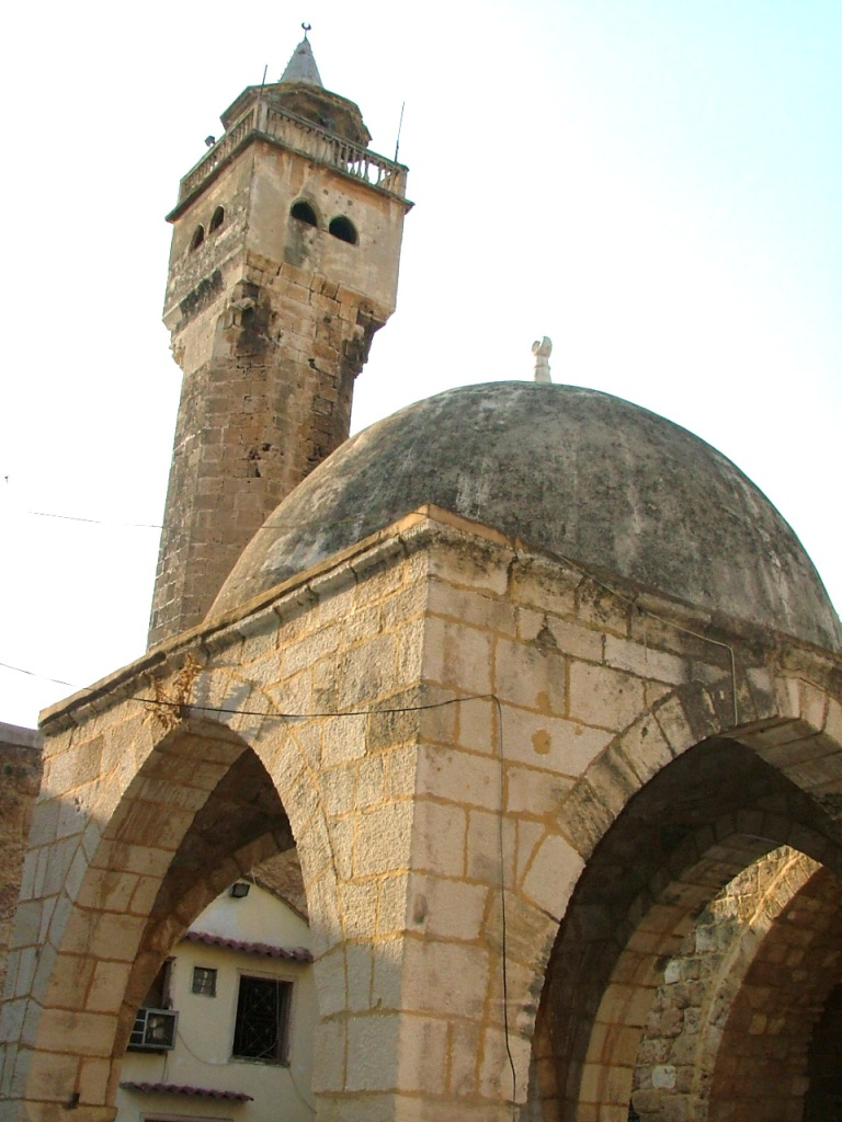 ماذنة مسجد التوبة